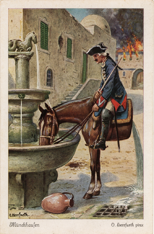 Münchhausens Abenteuer. Postkartenserie nach den Lügengeschichten des Baron Münchhausen. Serie der Firma UVACHROM (Verlag Farbenphotographische Gesellschaft m.b.H., Stuttgart) in zwei Folgen von je sechs Postkarten. Folge I: Serie 324. Nr. 4912–4917. Folge II: Unknown Text der Rückseite: In einem Gefecht mit den Türken hatte Münchhausen an vorderster Stelle gekämpft und den Feind bis auf den Marktplatz eines Städtchens verfolgt. Sein Pferd eilte dem Brunnen zu und trank unmäßig viel. Als er umschaute, bemerkte er, daß im Gefecht seinem Tier das ganze Hinterteil abgeschnitten war, und das Wasser hinten wieder herauslief. Draußen vor der Stadt aber fand er die andere Hälfte des Wunderpferdes und ein Kurschmied heftete das Tier wieder zusammen.